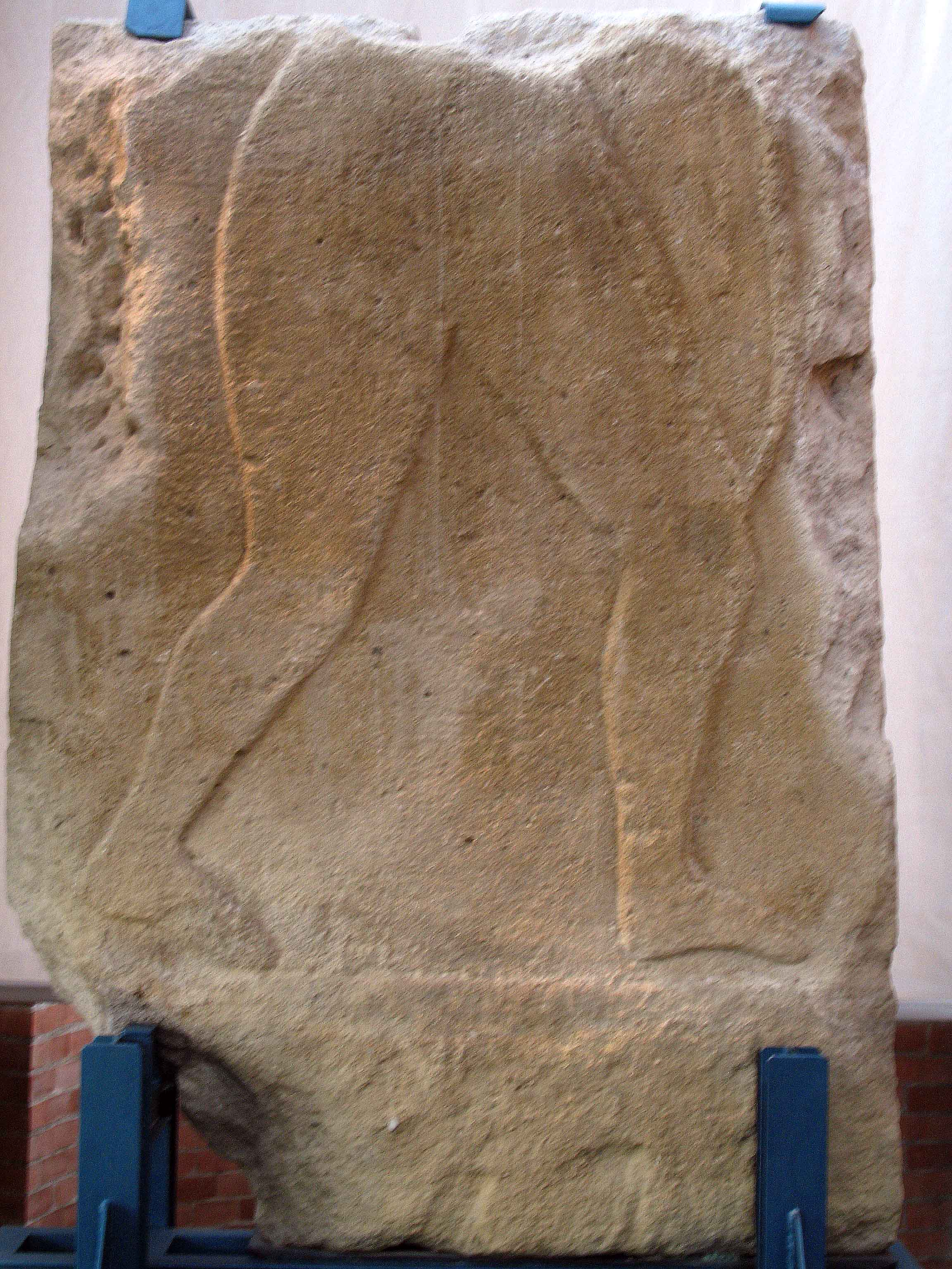 stele etrusca dell'arciere (VII secolo A.C.) San Casciano in Val di Pesa, museo di San Casciano